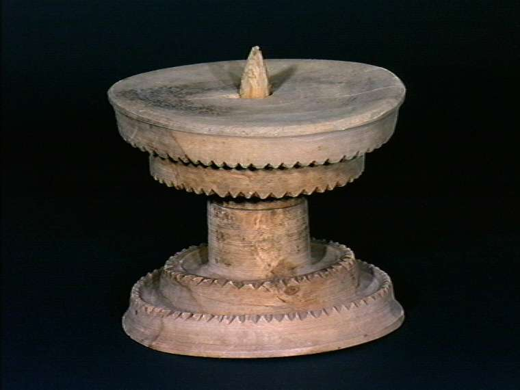 Smørstett fra 1800-tallet dreid i bjørk, fra Voss i Hordaland. Foto Anne-Lise Reinsfelt / Norsk Folkemuseum, NF.1925-0101.